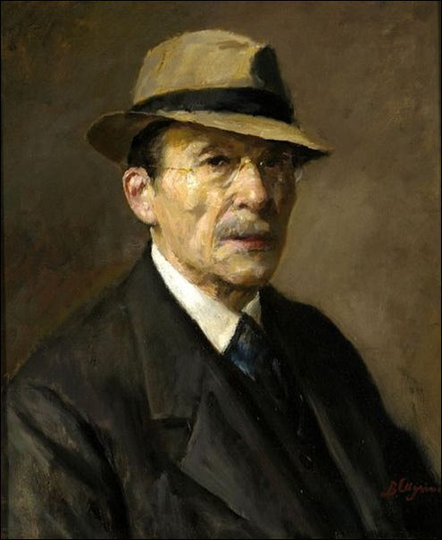 Self-portrait